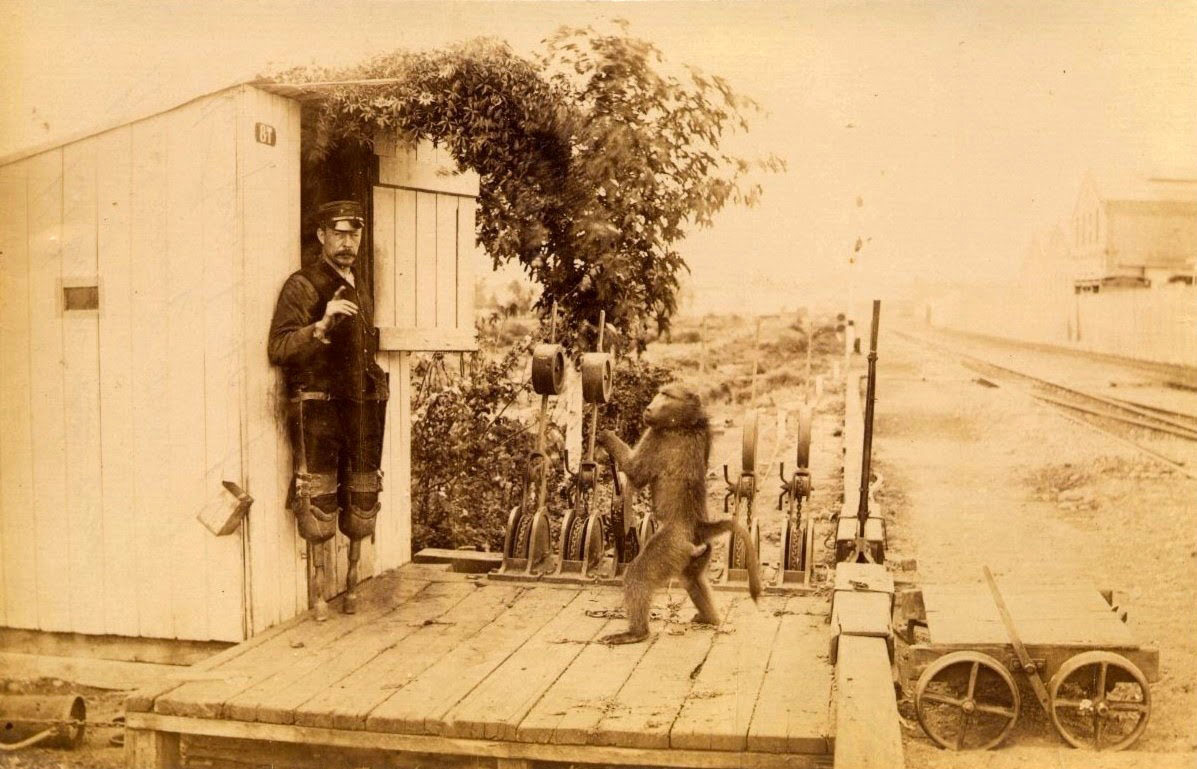 Jack, der Bärenpavian Assistenztier eines Streckenwärters in Südafrika vor 1890